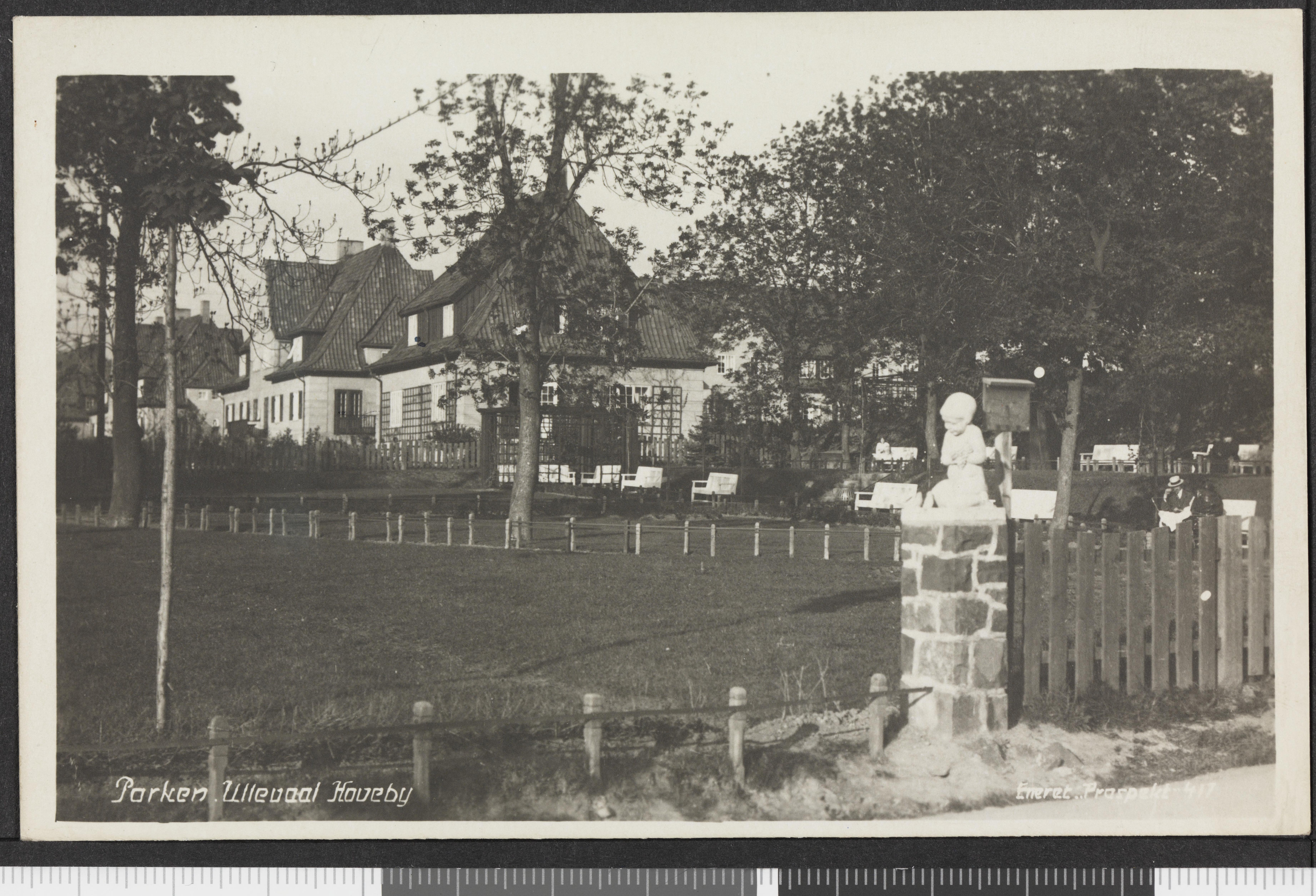 Bildet er hentet fra Nasjonalbibliotekets bildesamling Ullevål, Oslo, Oslo